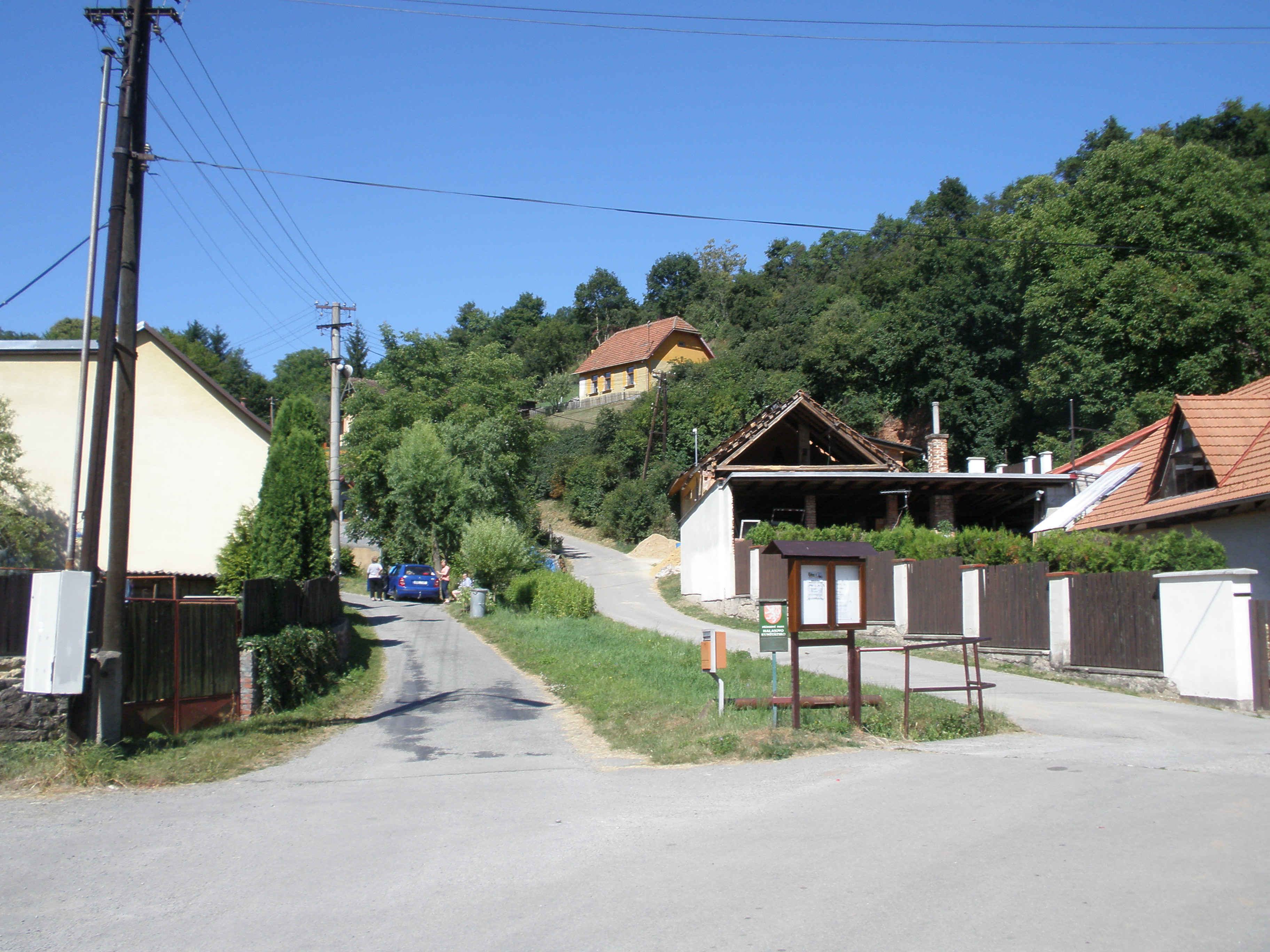 Sasina, místní část Svitávky, v okrese Blansko